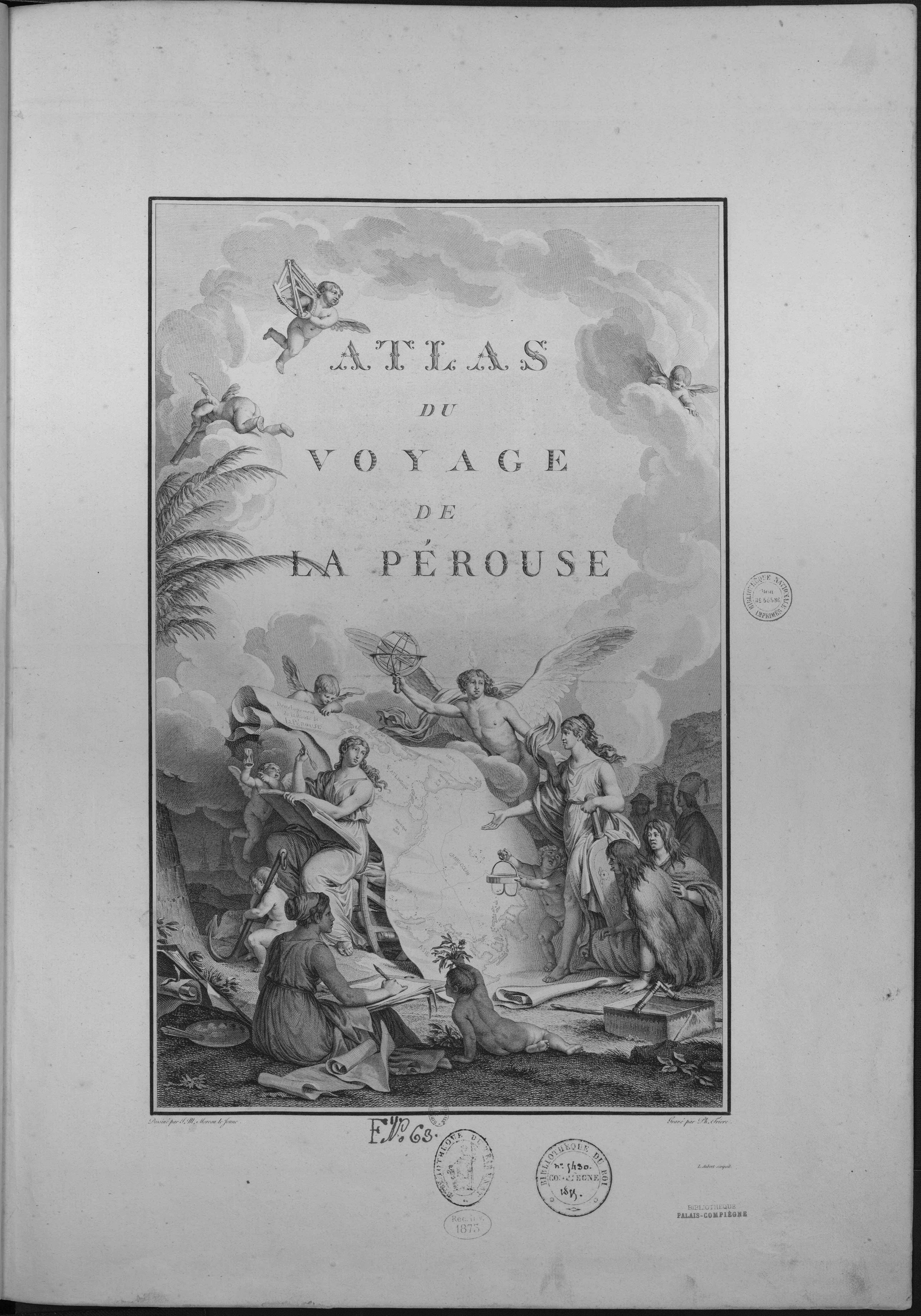 Atlas du voyage de La Pérouse